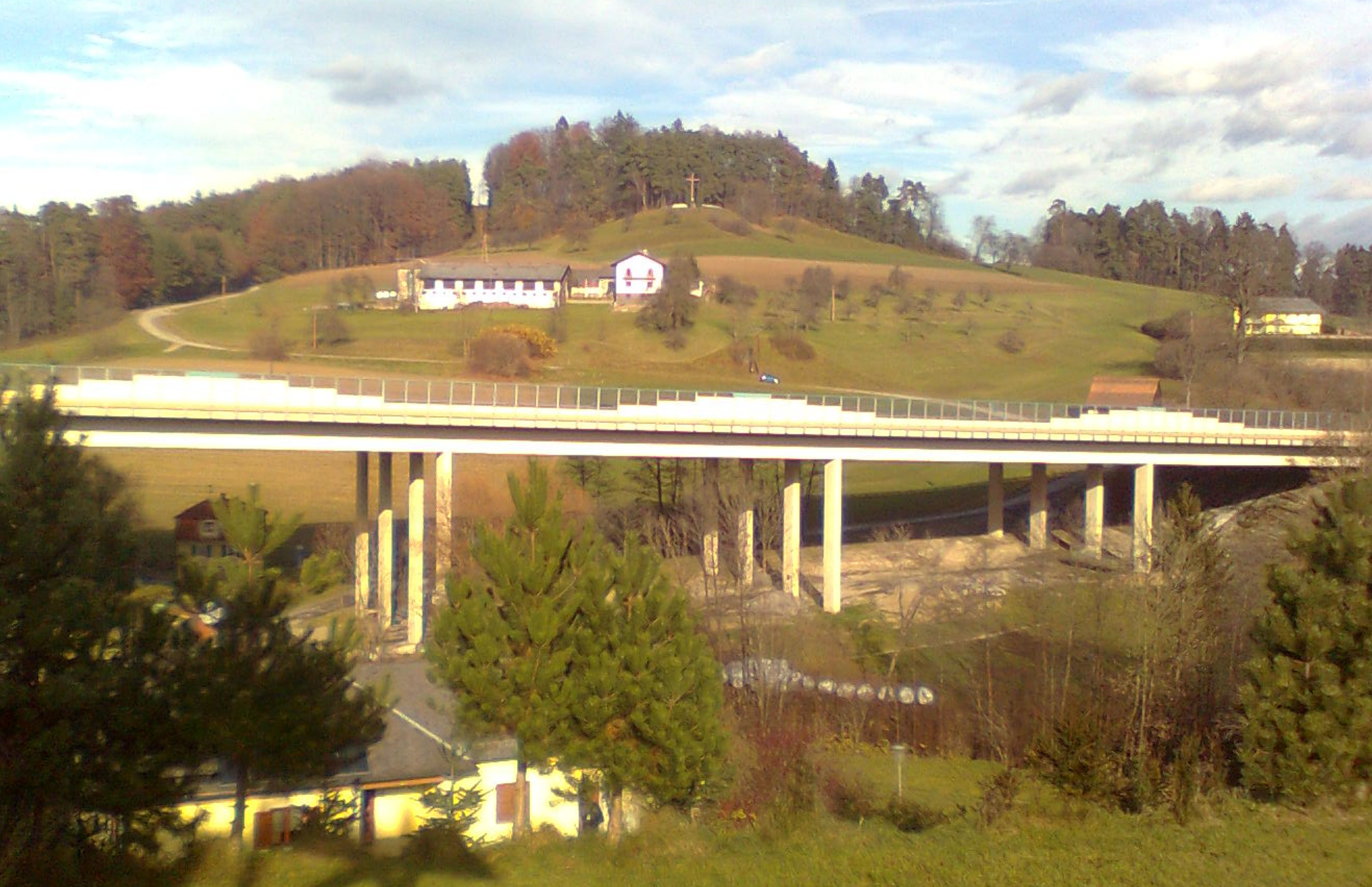 Im Vordergrund der Talübergang der A2 in Nestelbach bei Graz, im Hintergrund das Kriegsopferdenkmal